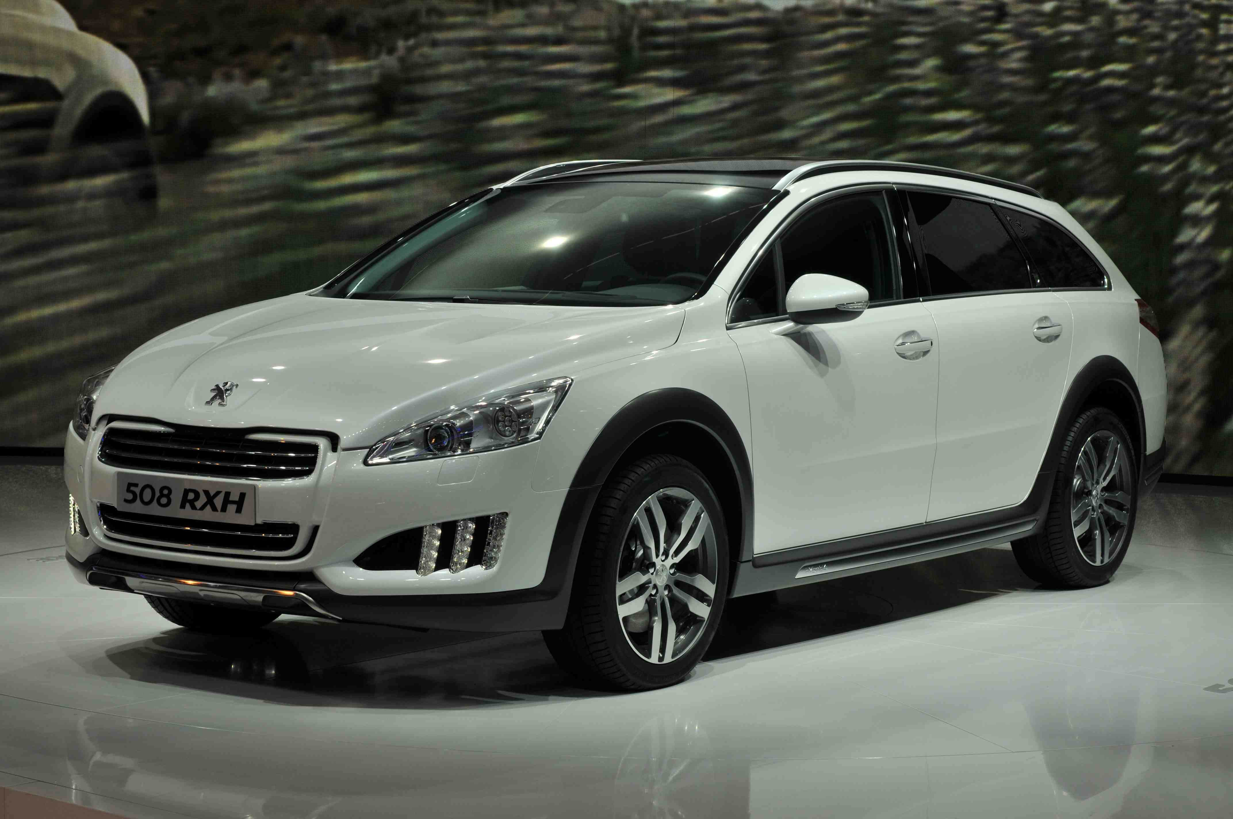 IAA 2011 - Internationale Automobilausstellung in Frankfurt/Main